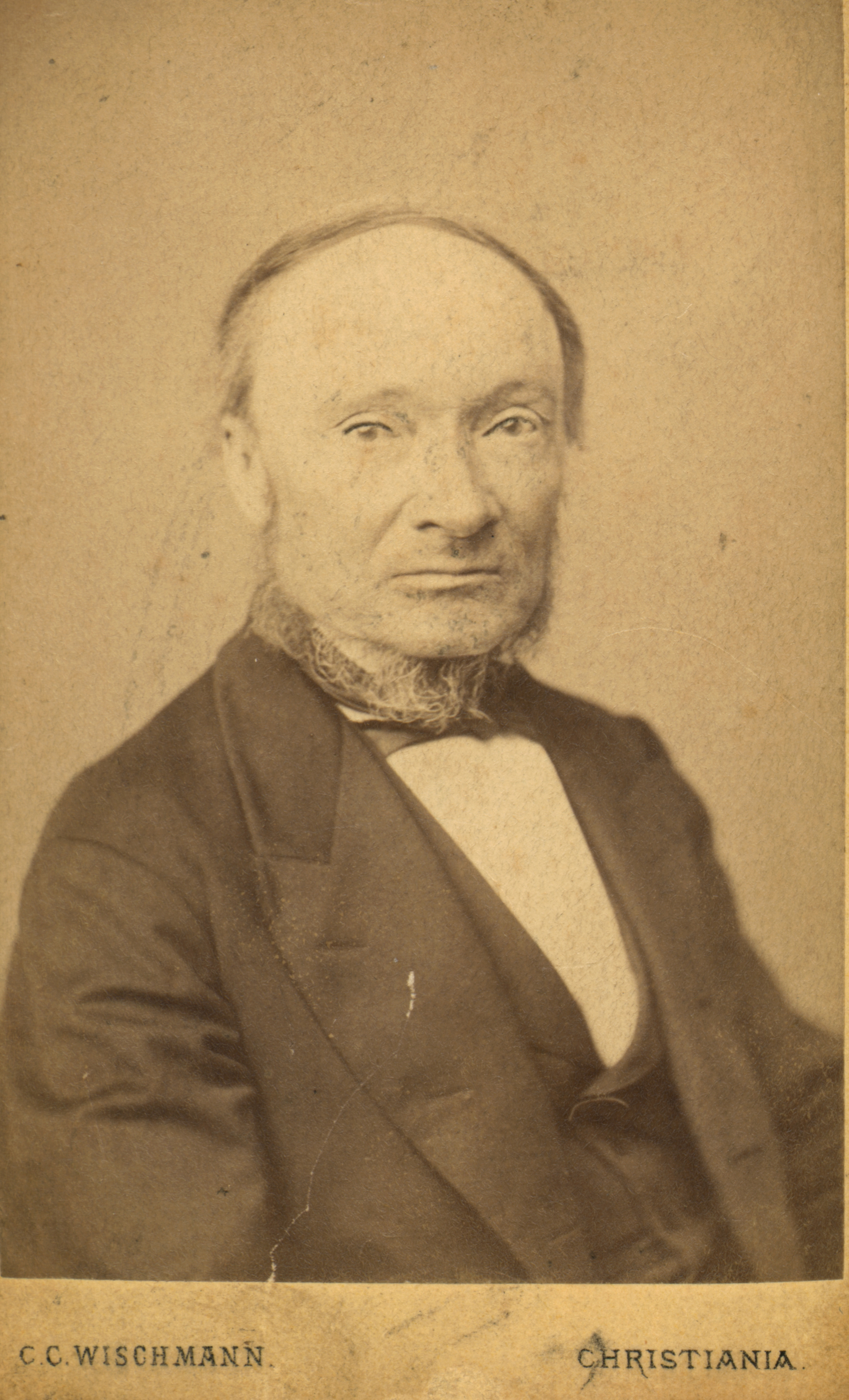 Biletet er eit portrett av språkforskaren, språkgrunnleggjaren og diktaren Ivar Aasen (1813-1896). Biletet er teke i 1871 då Aasen var 58 år gammal. Det at Ivar Aasen endeleg let seg avfotografere i 1871, hadde det ein særleg grunn. Systra hans, Ingeborg Melset, bad han om å få eit bilete. I dagboka 11. august 1871 skriv Aasen: "Hos en Fotograf". To dagar seinare les vi: "Hos Fotografen 1 dl. Slet Humør". Kjelde: Djupedal, Reidar (1988): "Ivar Aasen og den nye svartekunsten". Syn og Segn 1-2/1988